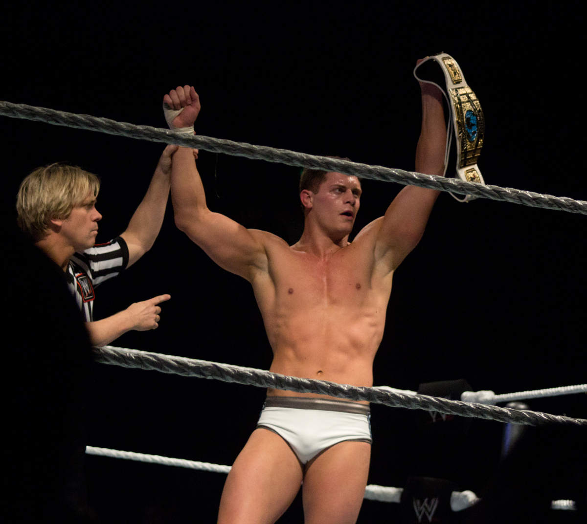 Charles Robinson raises Cody Rhodes hand